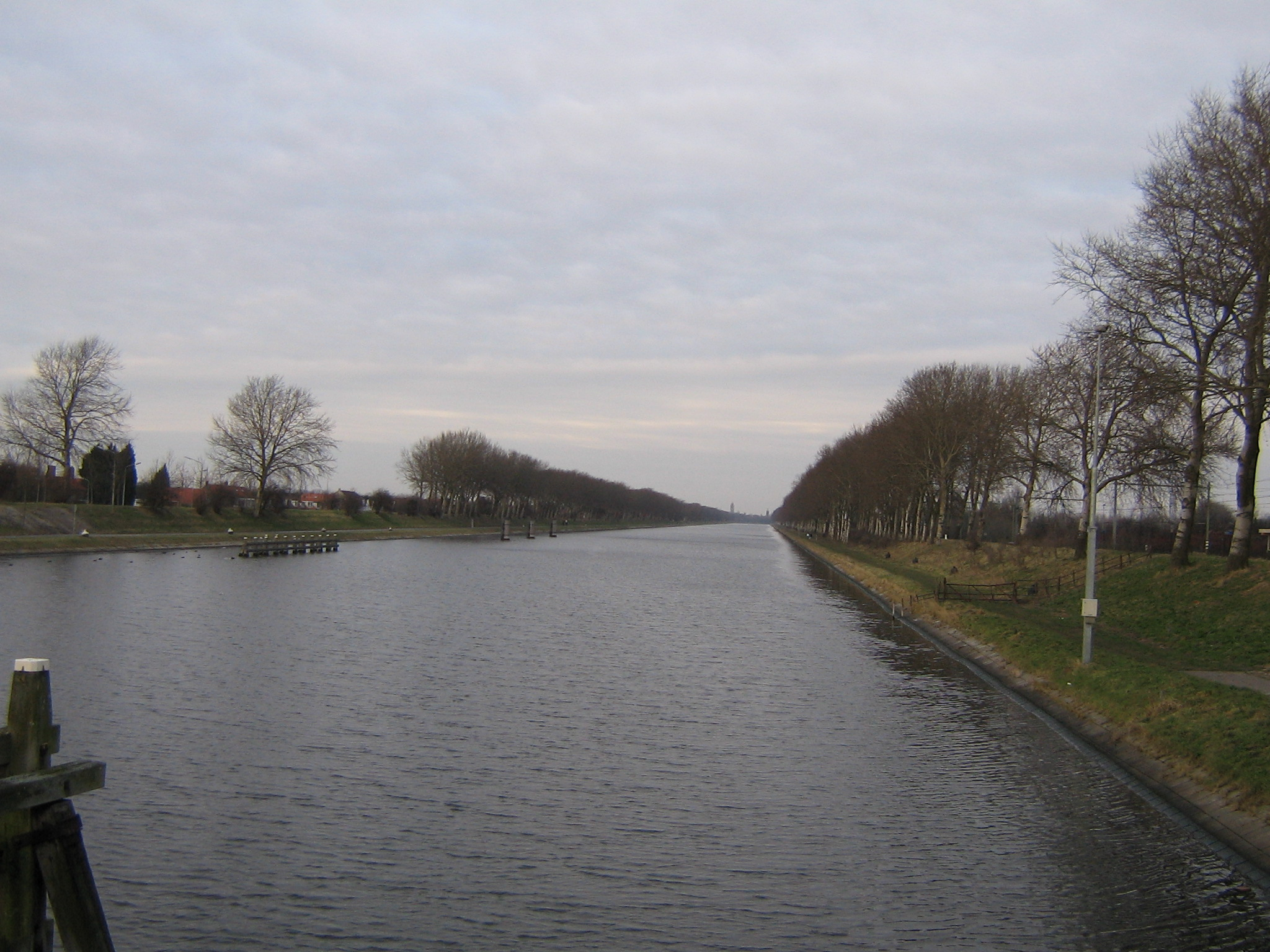 Kanaol deu Walchere, vanaf de draoibrugge bie SoeburgKanaal door Walcheren, vanaf de draaibrug tussen Oost- en West-SouburgWalcheren canal, from Souburg bridge